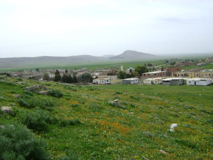 مدينة عين البرج في فصل الربيع